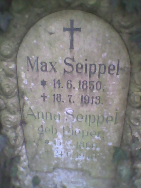 Grabstelle Max Seippel Marburg